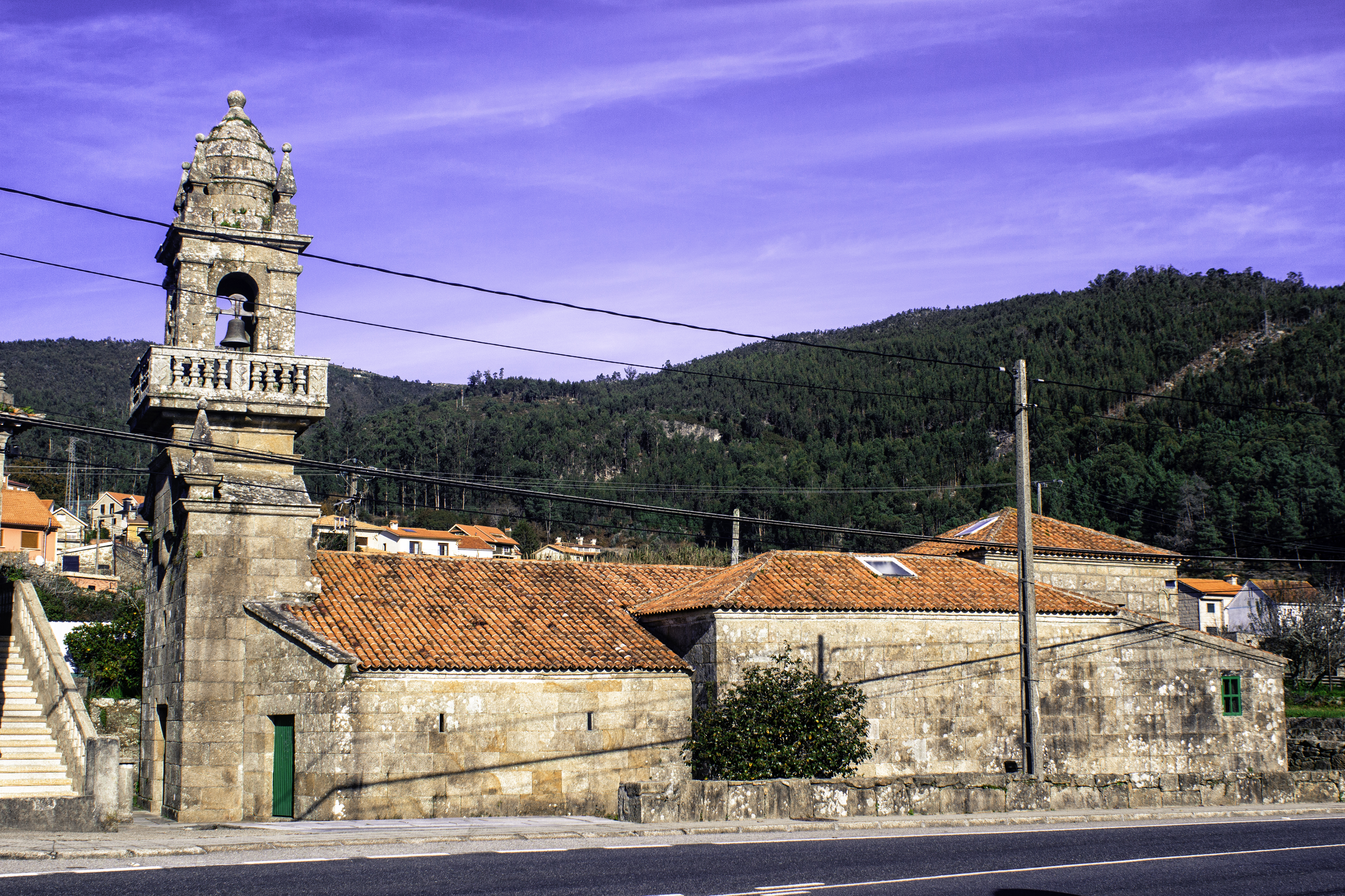 Igrexa de San Pedro de Domaio, no concello pontevedrés de Moaña.